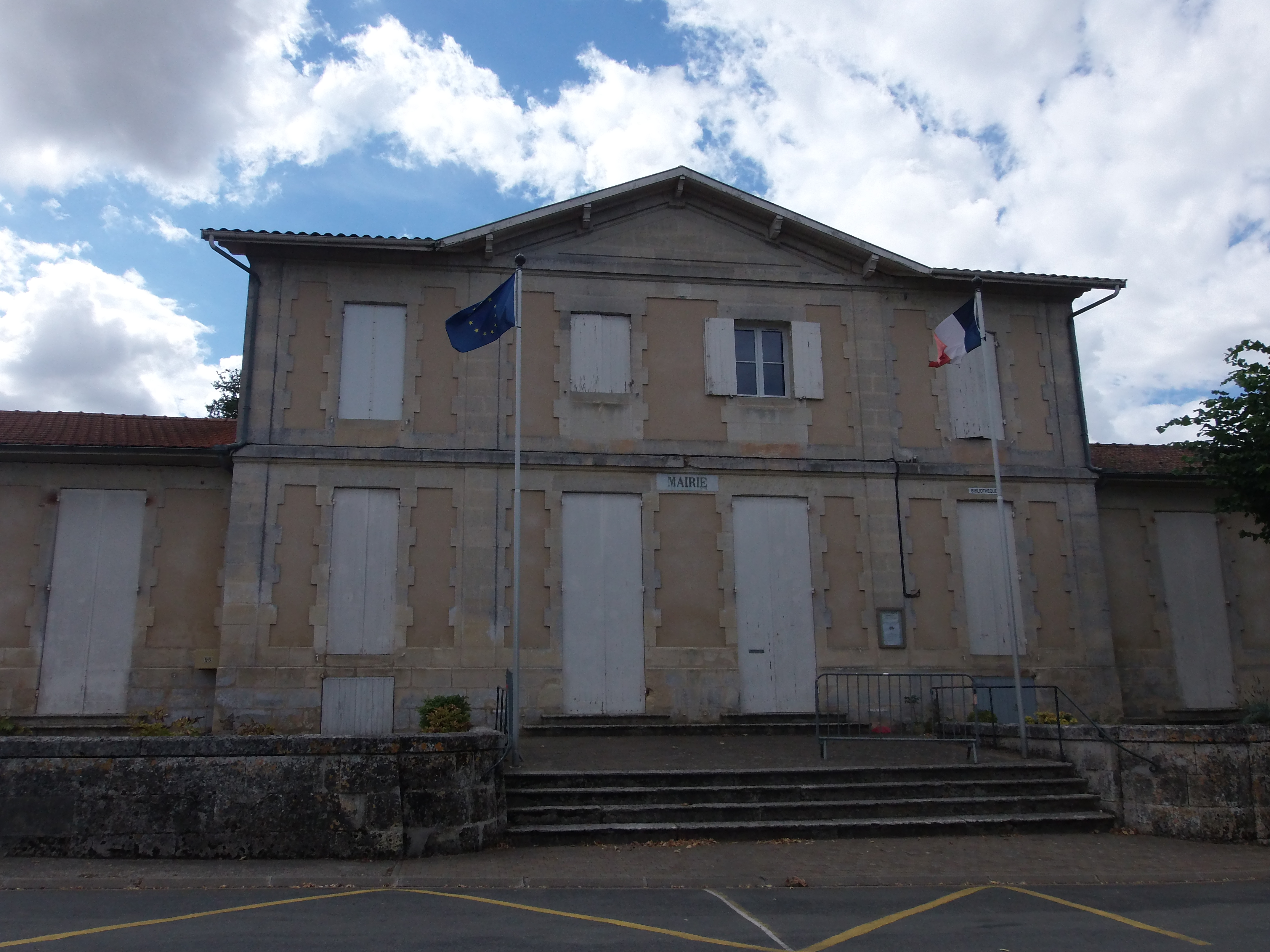 Mairie d'Asques (Gironde,France), village de la rive droite de la Dordogne.